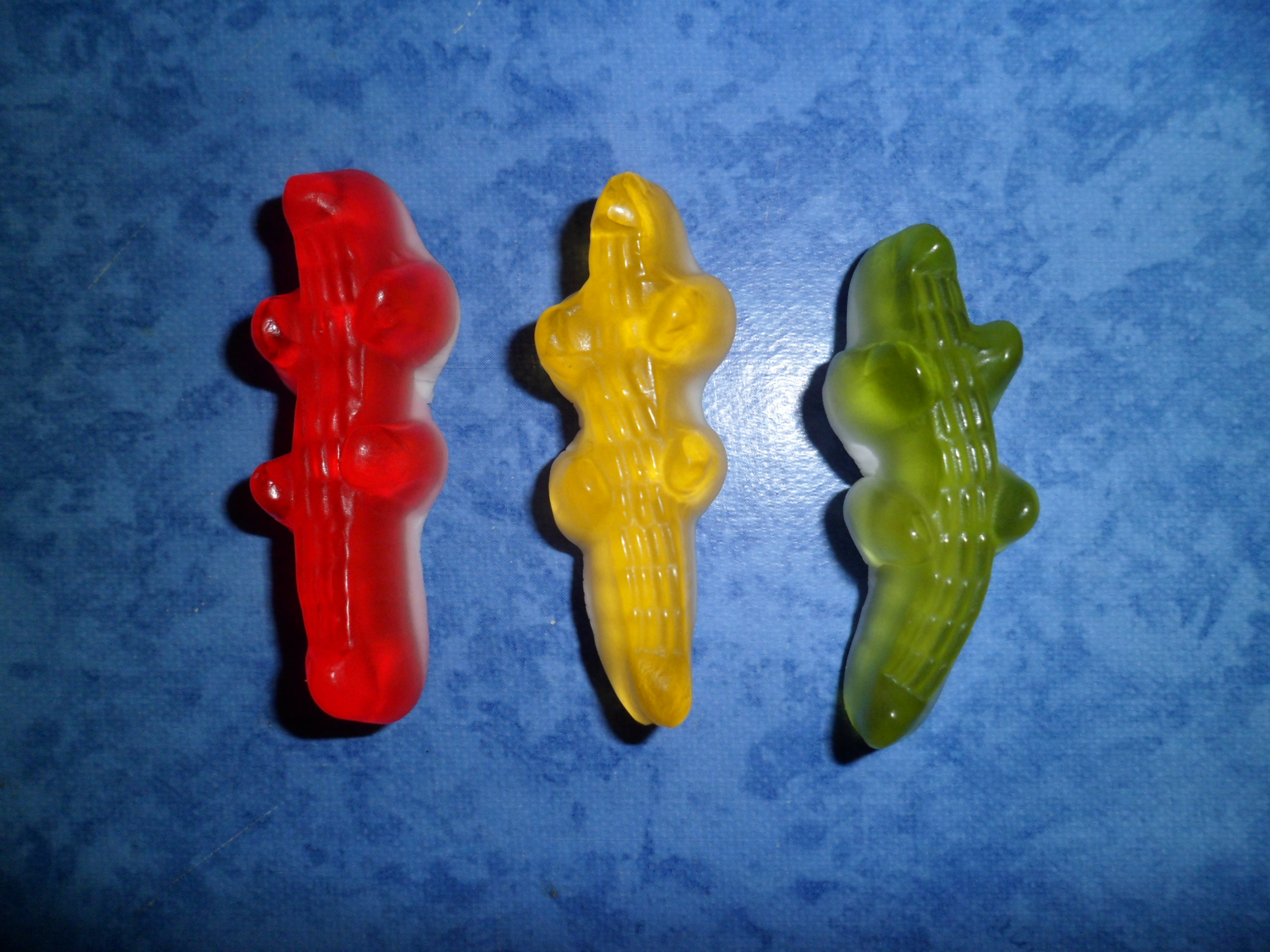 3 variantes (Rouge, verte et jaune) posées sur une nappe bleue marbrée